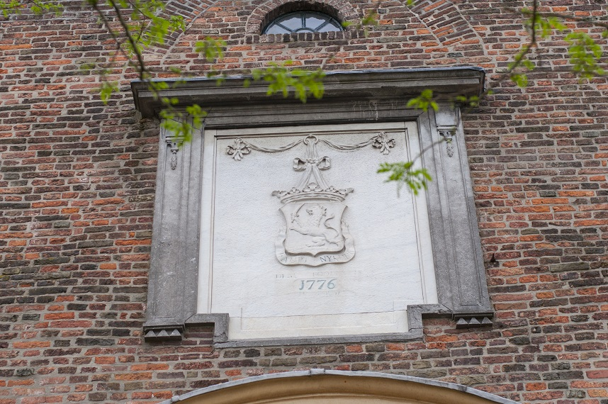 Gedenksteen voor de bouw van een nieuwe toren voor de Grote Kerk in Nijkerk in 1774-1776.